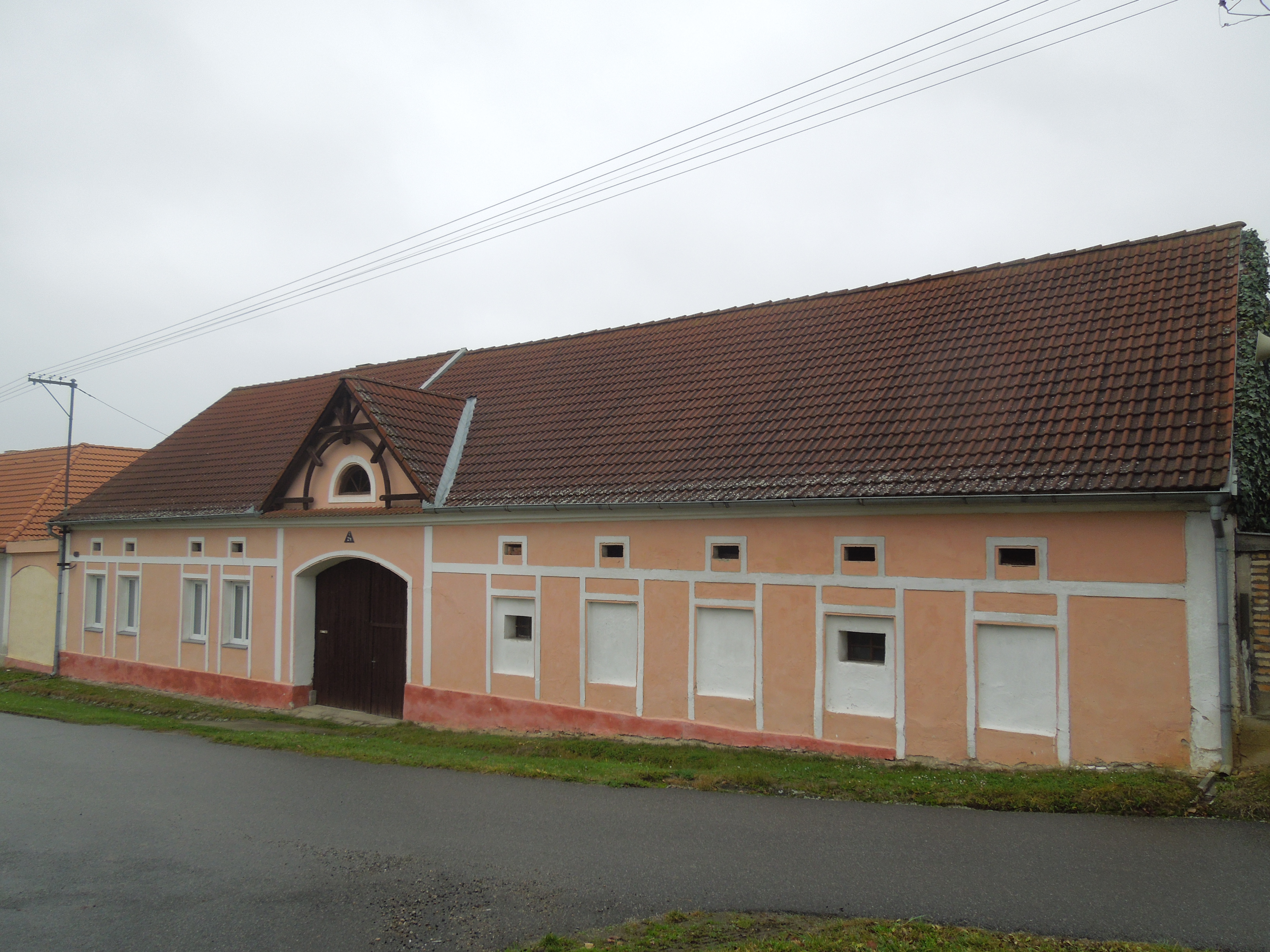 Bývalý statek U Mušků zvaných Krejčích